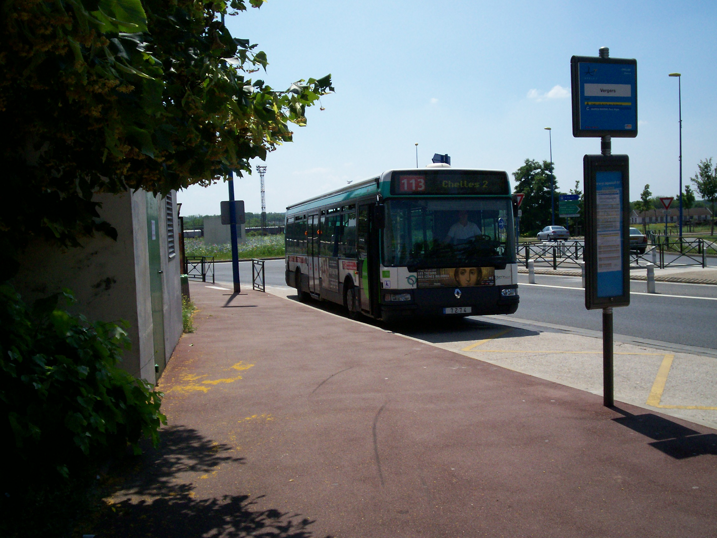 Bus 113 en direction de Chelles 2, à l'arrêt "Rue du Chelléen"